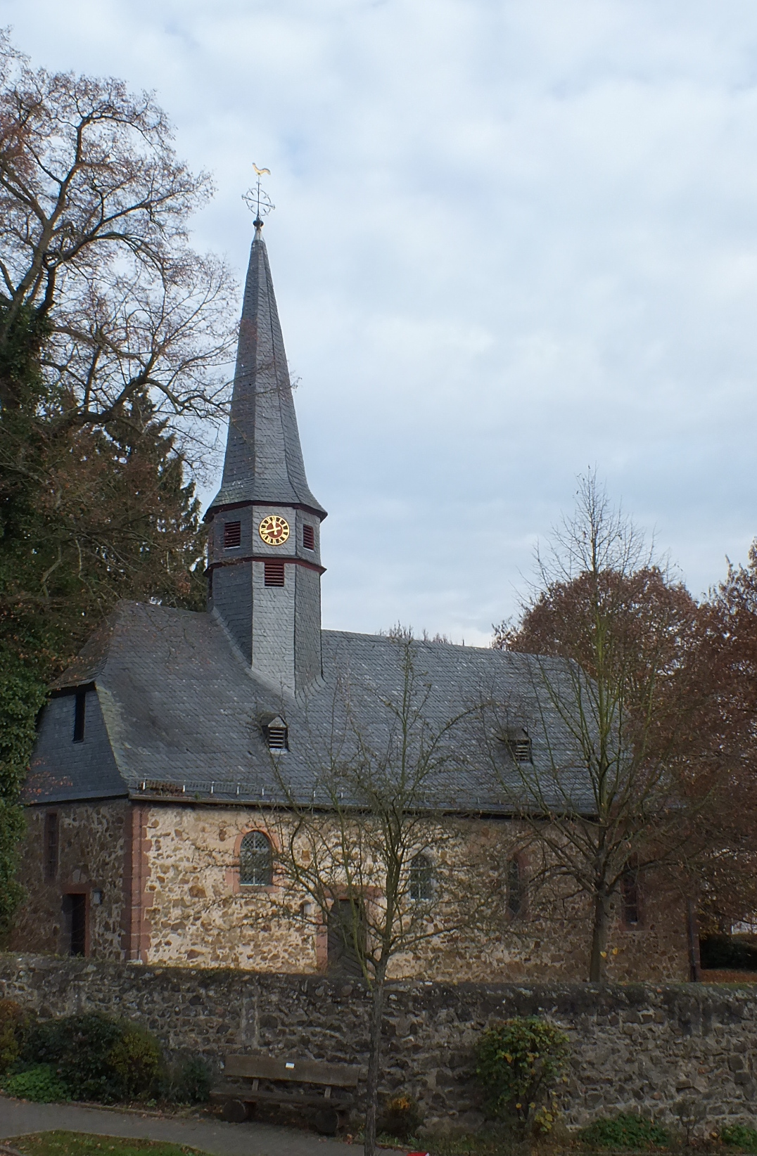 Evangelische Kirche Launsbach, Gemeinde Wettenberg, Landkreis Gießen, Hessen, Deutschland